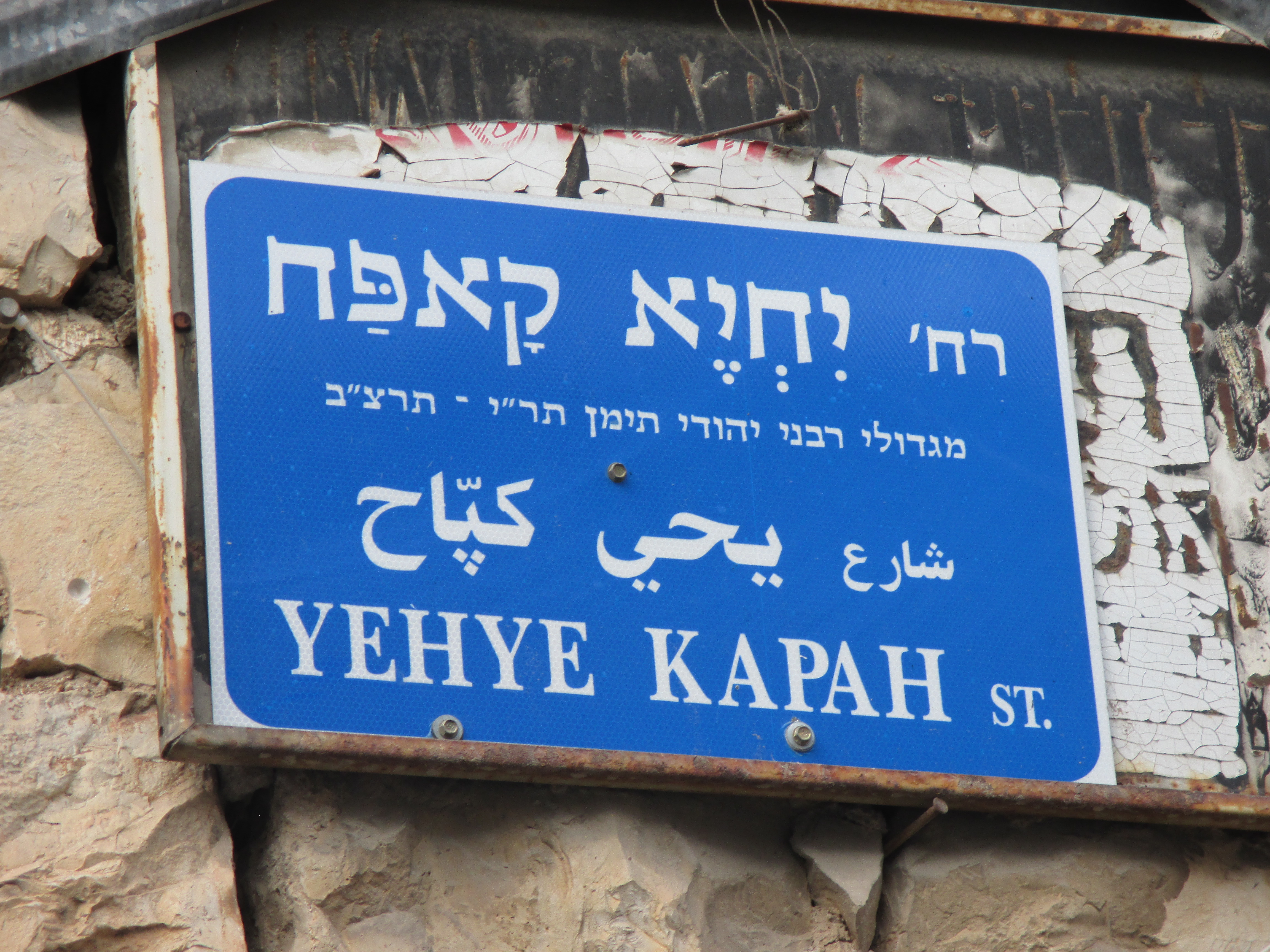 שלט רחוב יחיא קאפח בירושלים